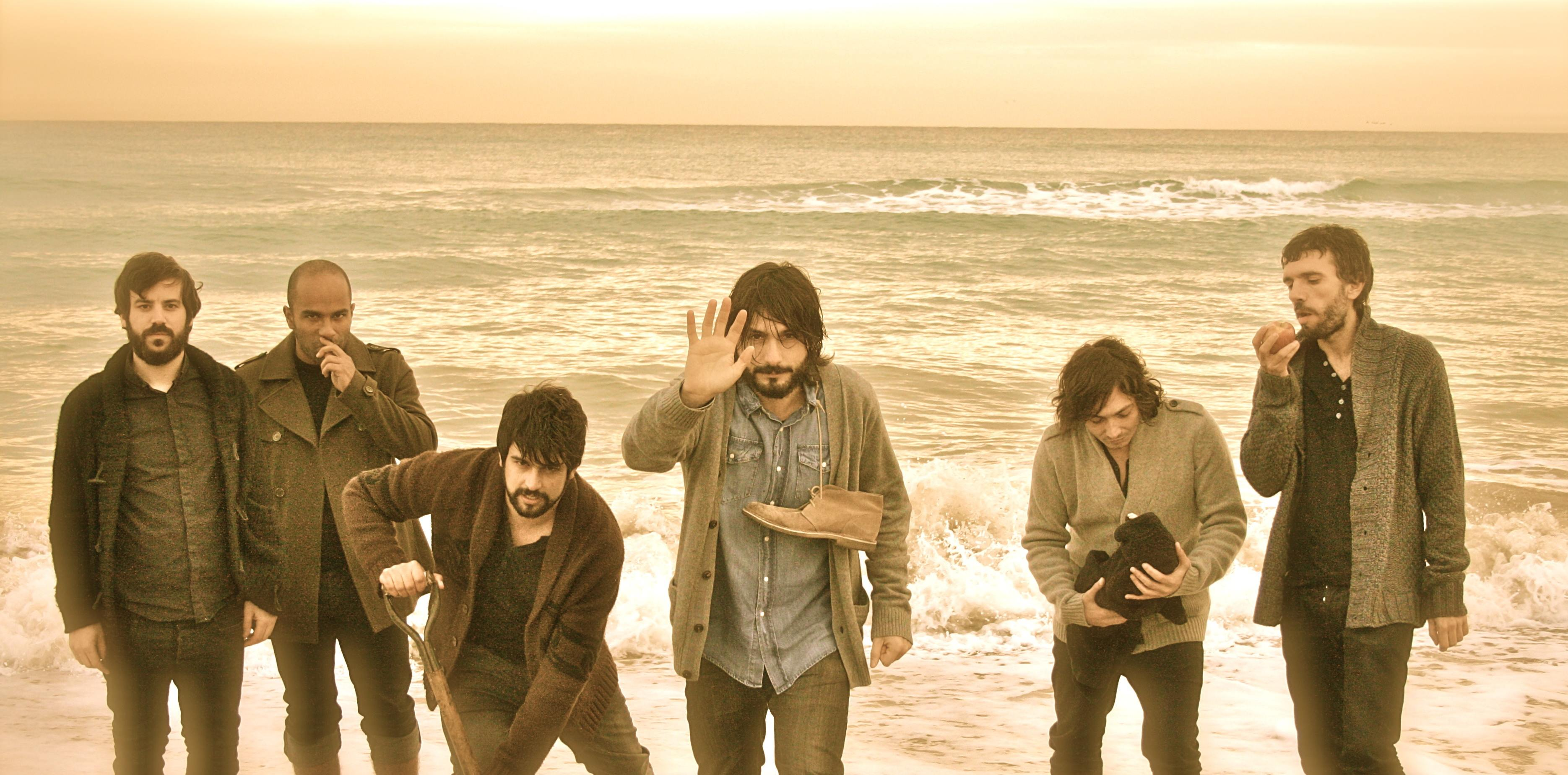 Biografía Sweater nace a finales del 2001, influenciados por la escena musical independiente barcelonesa y el pop-rock anglosajón. Su visión creativa se mueve siguiendo esas tendencias, pero deja espacio a la incursión de otros estilos musicales. Esta serie elementos y una cuidadosa elaboración de los textos, aporta al sonido Sweater una rara mezcla de misterio y frescura, de tristeza e ironía y proporciona a sus canciones un algo poco común, pero que las hace, al mismo tiempo, fácilmente reconocibles. Son melodías que acaban formando parte de la banda sonora del imaginario general. Sweater maneja como elemento común entre sus seis componentes, la necesidad de comunicarse mediante la música. Respondiendo o reproduciendo directrices artísticas, estéticas y culturales generacionalmente adquiridas, los cinco barceloneses y el mallorquín, intentan transformar el entorno que les rodea mediante sus melodías y se mueven en él apuntando todos y cada uno de los matices necesarios. No es más que una interpretación conjunta y original de una realidad común. No es menos que el intento de entender qué pasa y cómo pasa y filtrarlo a través del lenguaje musical. Eso es Sweater, el punto de conversión de seis ideas, de seis visiones, de seis organismos en constante movimiento interno.